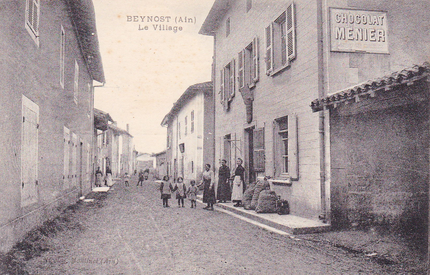 Carte postale - Rue centrale - Beynost. Publicité Cholocat Menier. Sur la carte elle-même : " Beynost (Ain). Le village ".